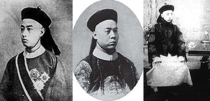 从左至右，依次是载振、溥伟、溥儁。非1898年至1900年间拍摄的照片。